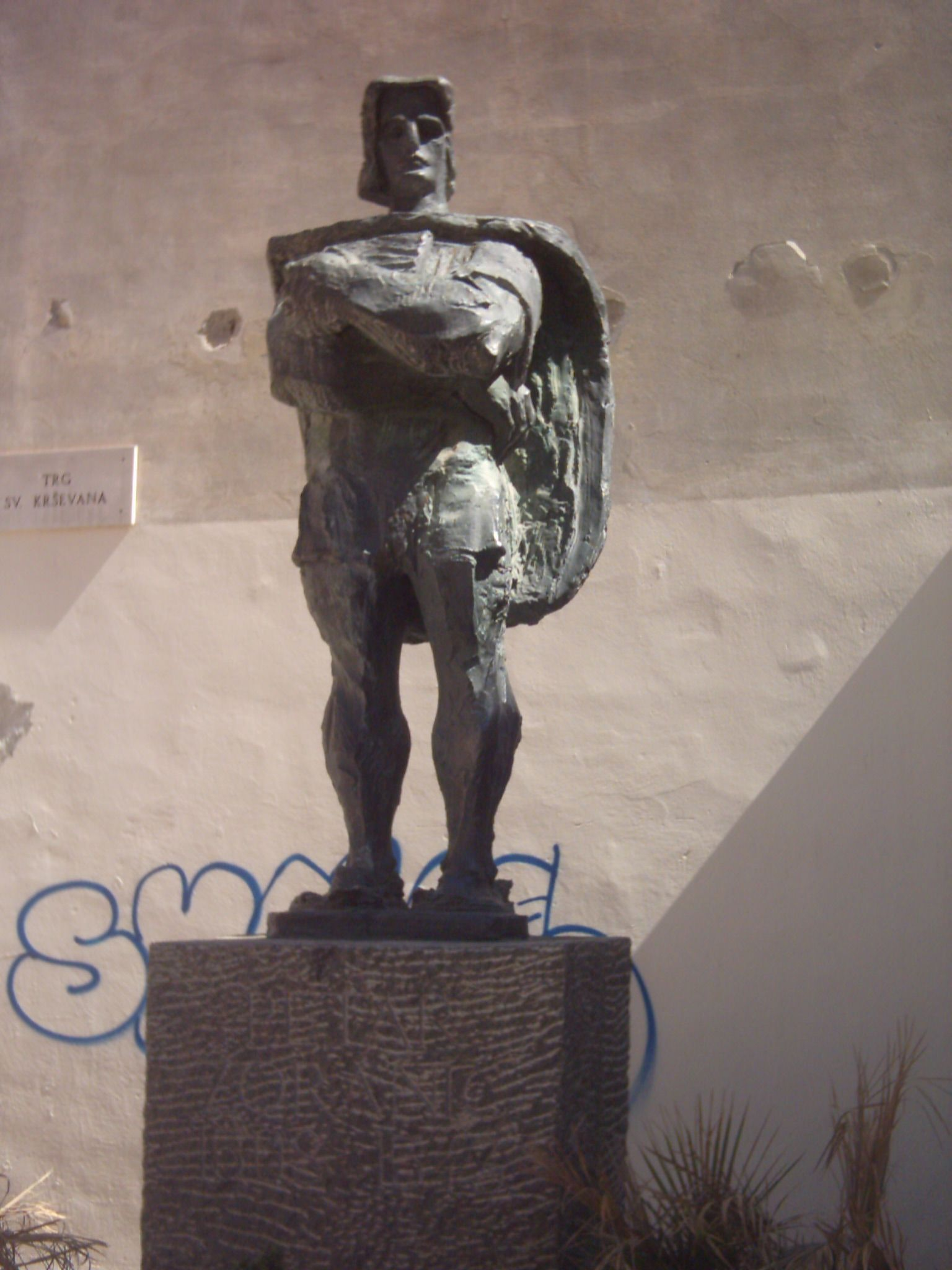 Petar Zoranić, pjesnik